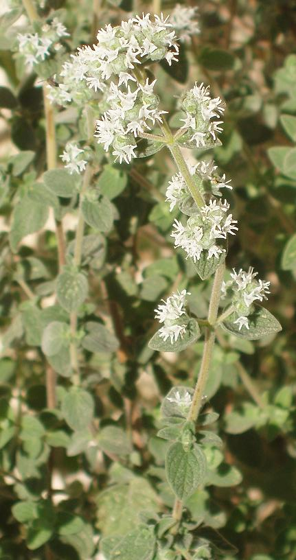 צמח he:זעתר.